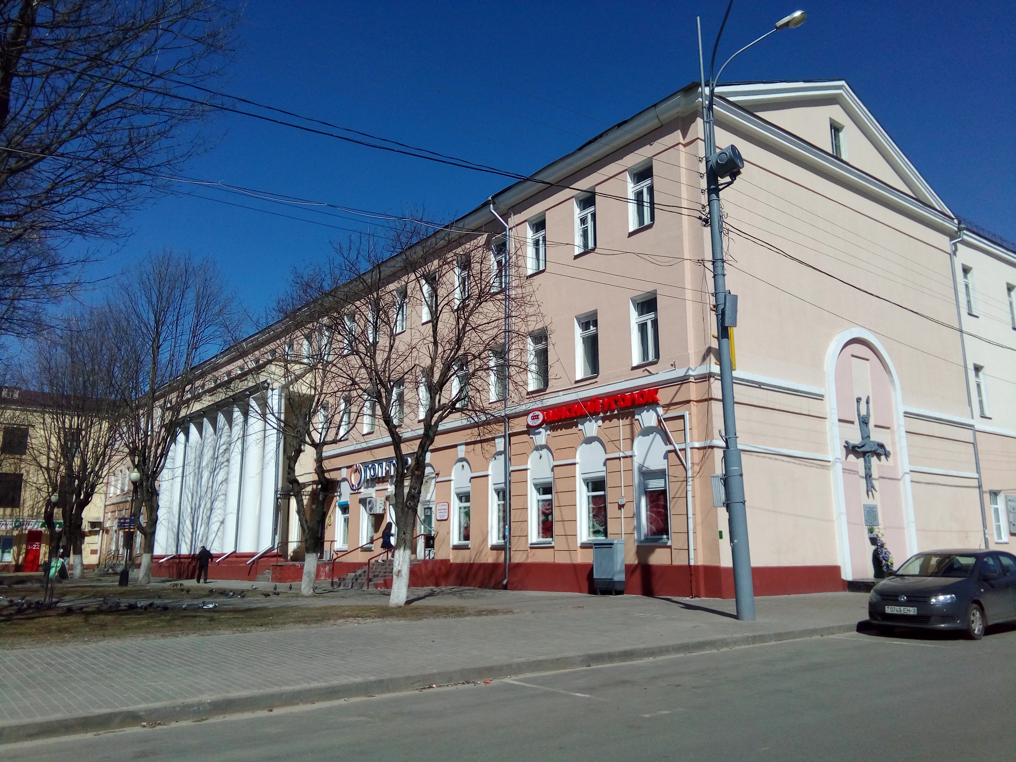 Будынак былой ланкастарскай школы ў Гомеле